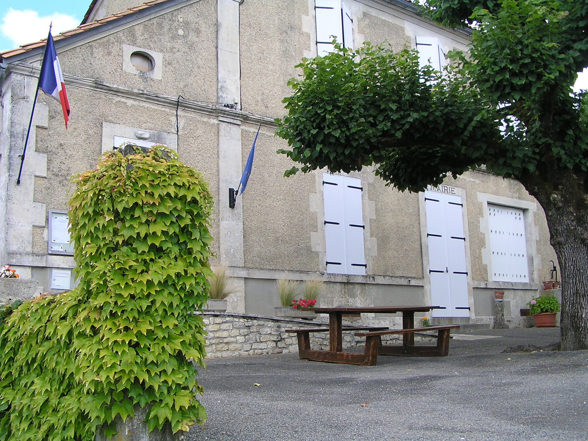 mairie de Sonneville